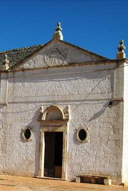 Chiesetta rupestre in località Monte Fellone